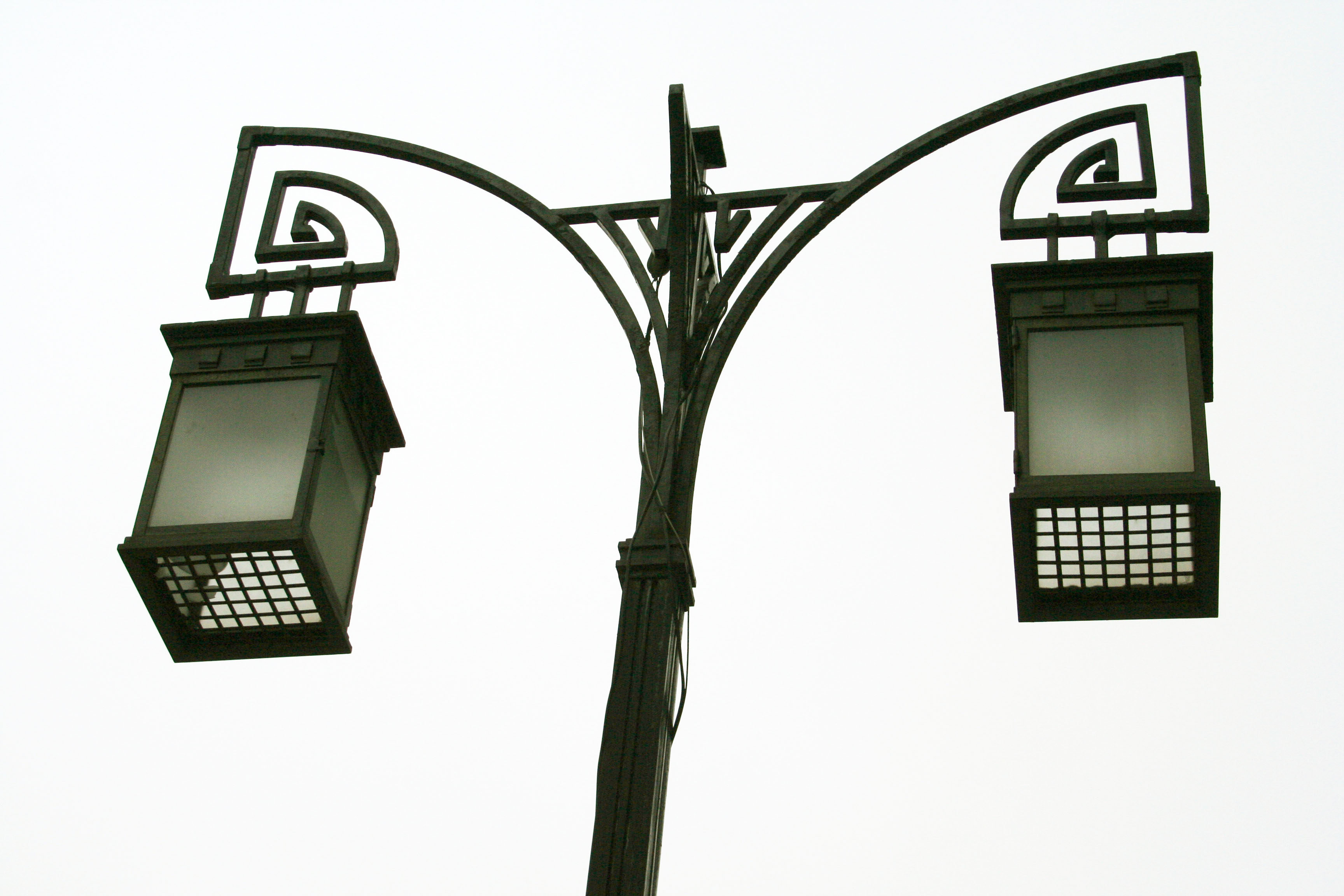 Kamergersky lane